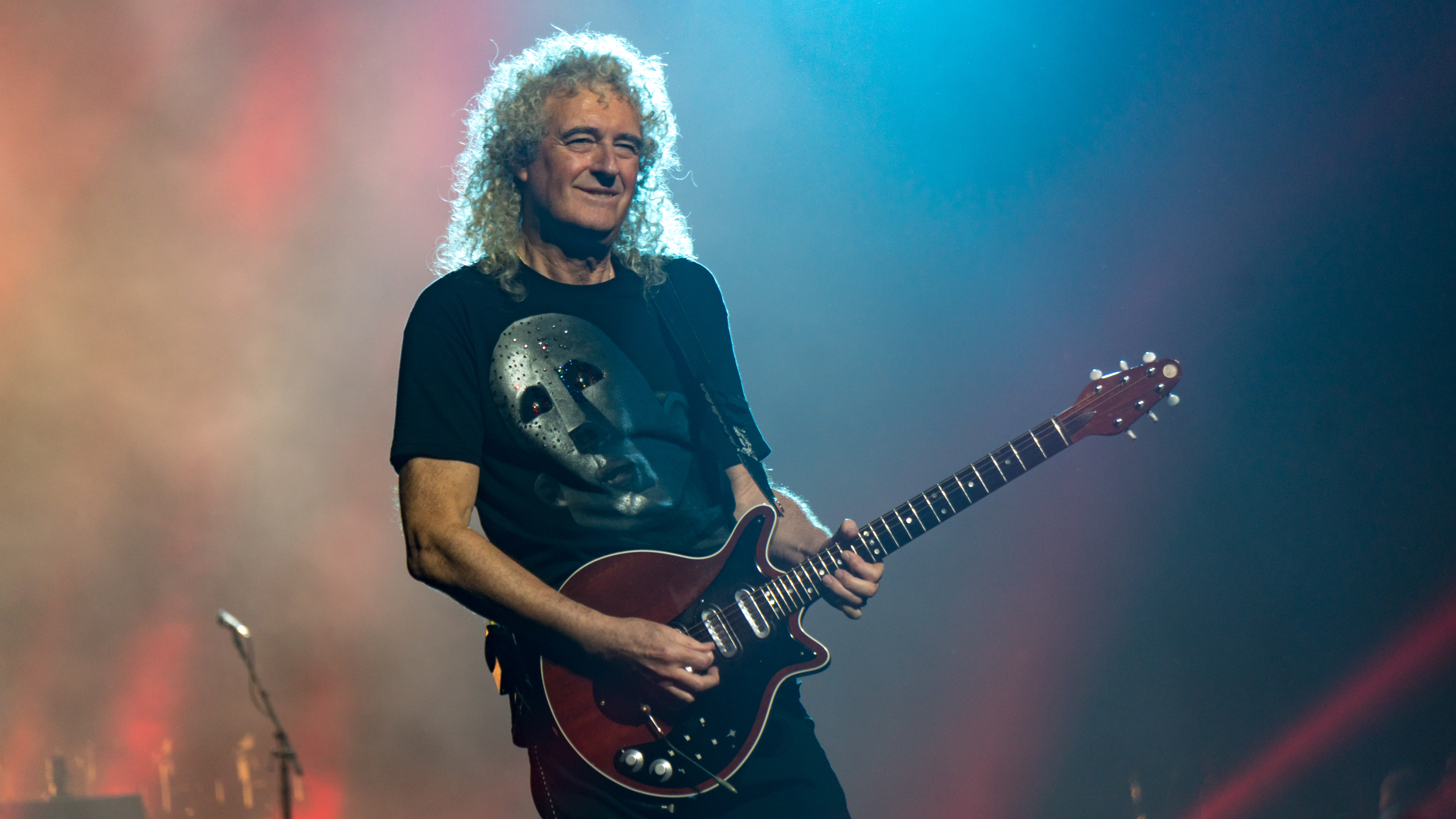 QueenO2121217-70